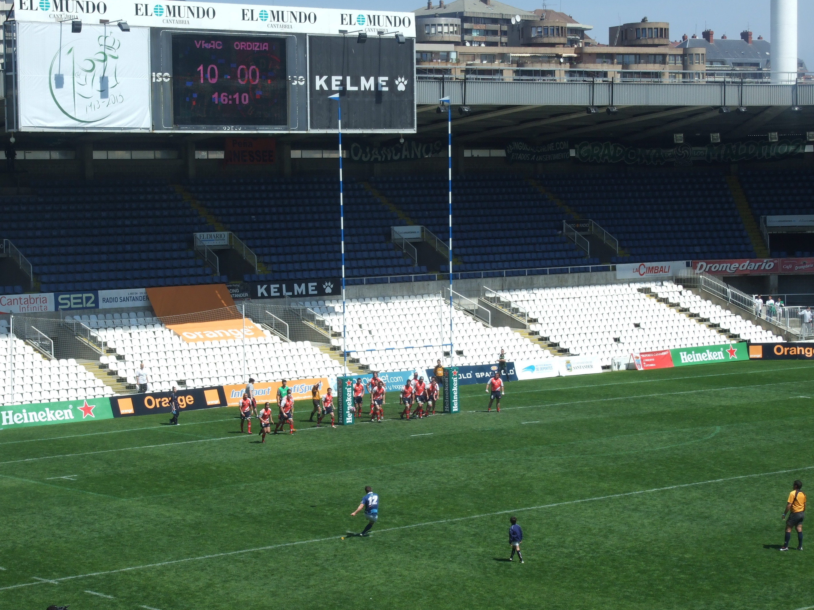 Copa del Rey de rugby 2013. VRAC Quesos Entrepinares ante AMPO Ordizia.